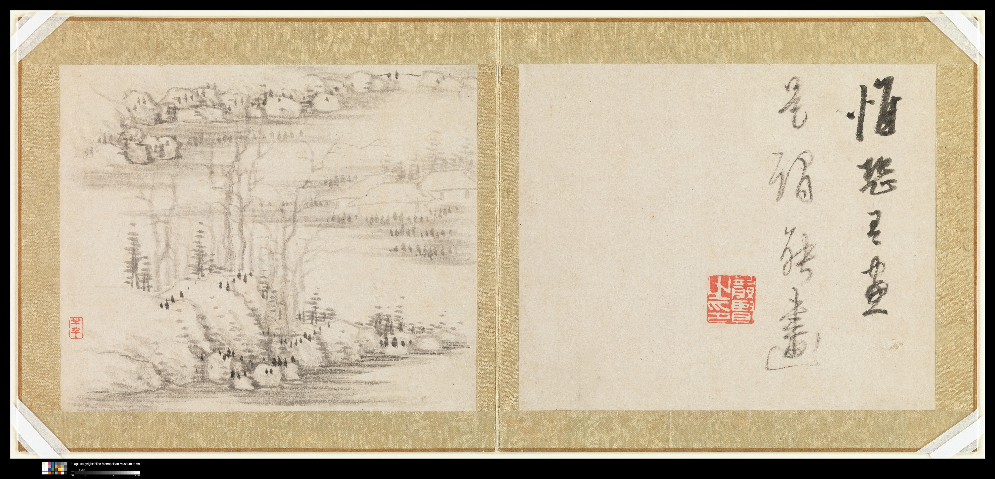 China; Album; Paintings